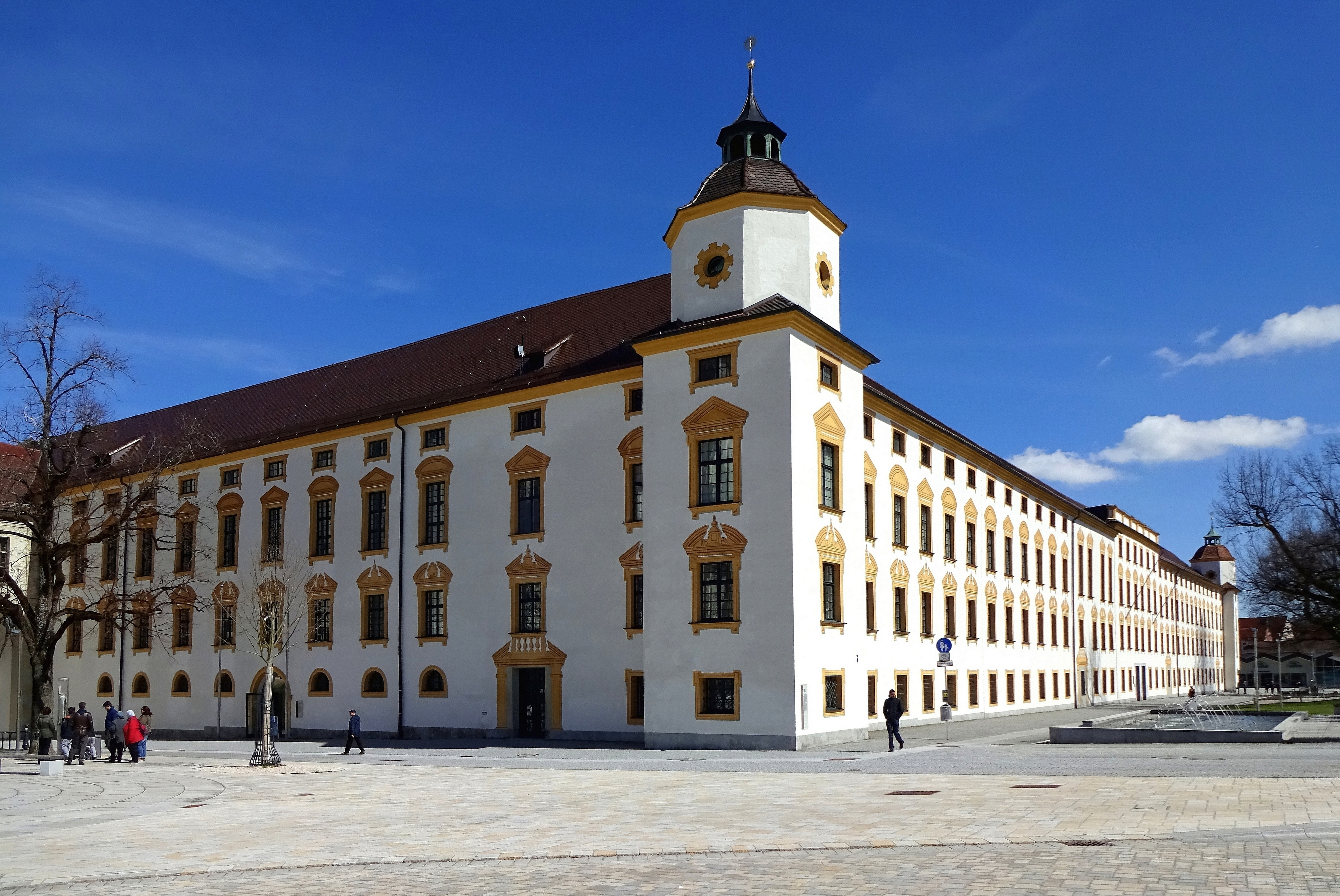 Ansicht von Südwesten